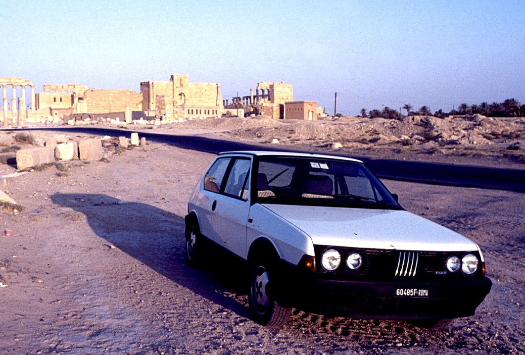 Fiat Ritmo 105TC. Sullo sfondo è visibile il colonnato di Palmira (Siria). La robustezza della vettura ha consentito di affrontare un viaggio di migliaia di chilometri, con l'attraversamento da ovest a est di buona parte della Turchia e del deserto siriano da Aleppo fino a Palmira. La vettura era equipaggiata con un 1600 bialbero, carburatore doppio corpo, da 105 cavalli. Il peso limitato, poco superiore ai 900 kg, consentiva ottime prestazioni con una velocità massima di oltre 180 km/h. La vettura raffigurata era equipaggiata con ruote in lega Pirelli e pneumatici sempre Pirelli a profilo ribassato (P6)